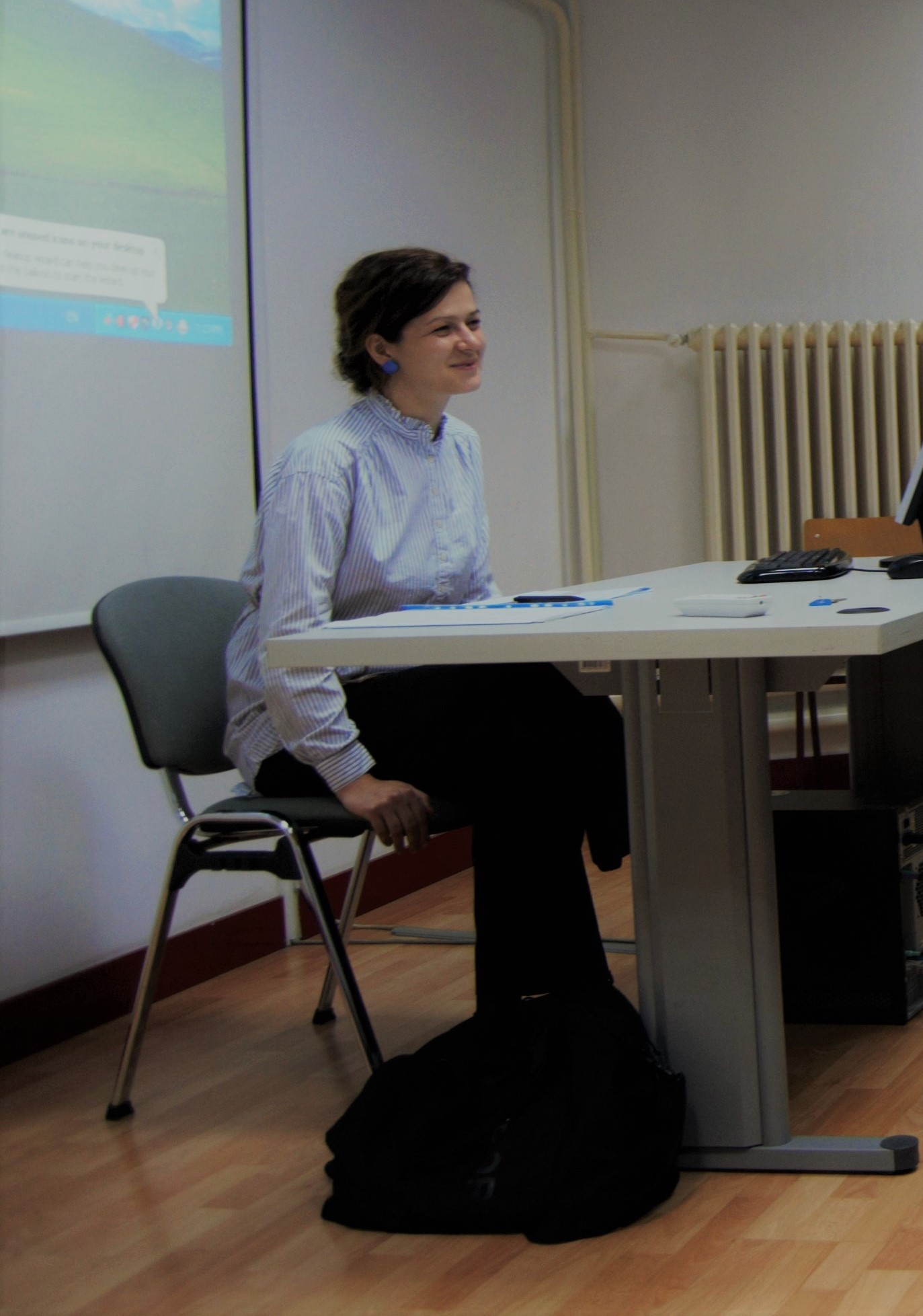 Srpski (latinica): Monika Milosavljević na predavanju studentima I godine na Filozofskom fakultetu Univerziteta u Beogradu